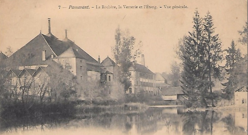 Verrerie de Passavant-la-Rochère en 1904